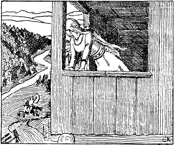 Christian Krogh: Illustration for Harald Hårfagres saga, Heimskringla 1899-edition. nn: «Kong Haralds sendemenn kjem andre gongen til Gyda.» nb: «Kong Haralds menn kommer for annen gang til Gyda.»